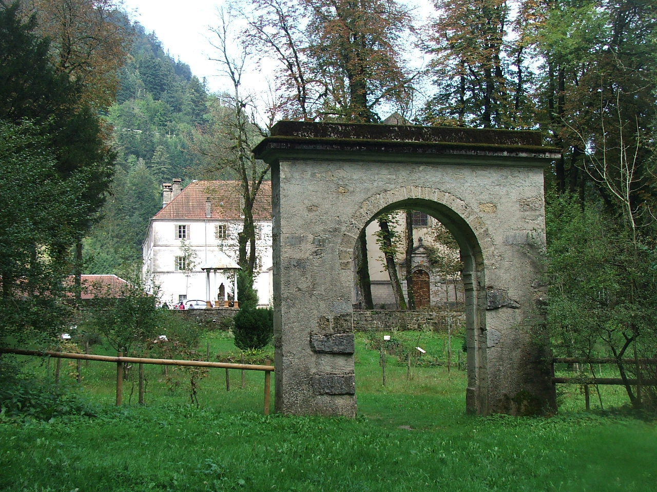 L'ancien séminaire de Consolation (Doubs - France). Image prise par Knard25.